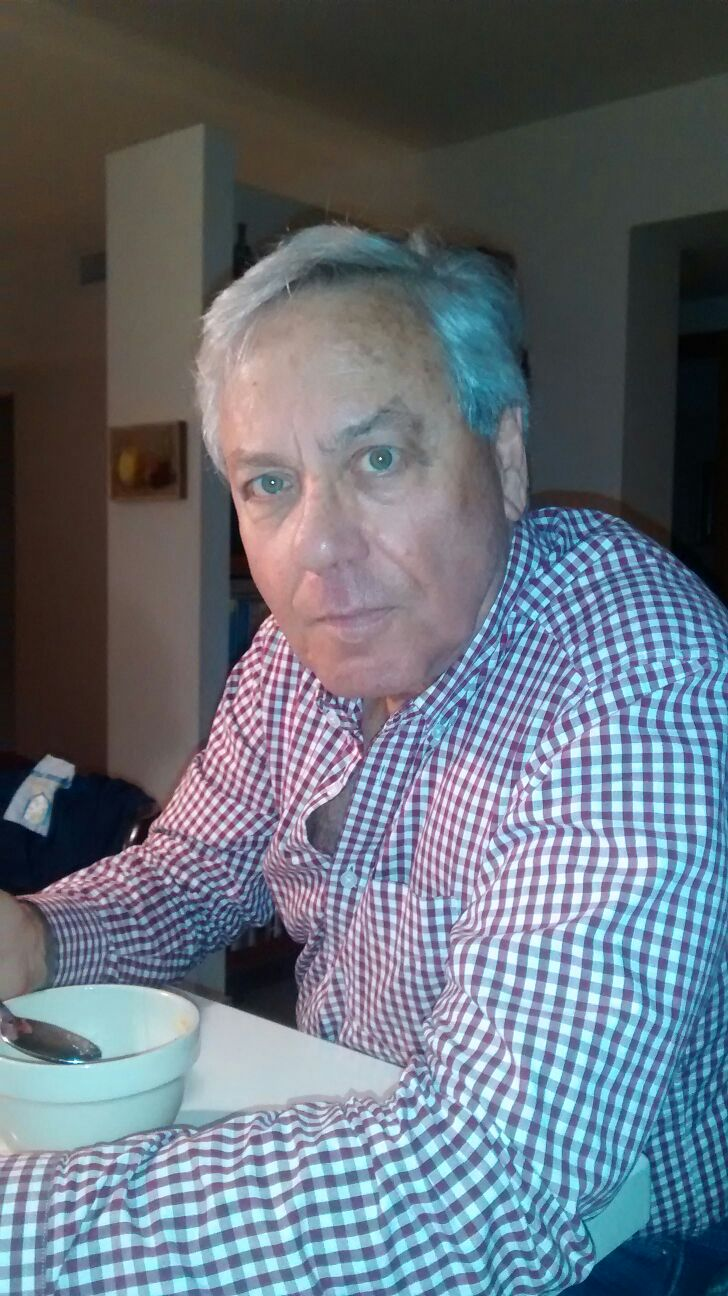 פרופ' דורון מנדלס דצמבר 2015